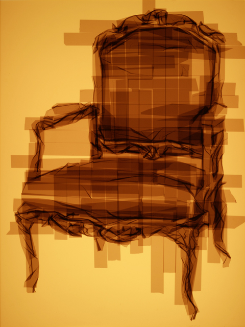 translucent packaging tape on acrylic panels with LED light box by Mark Khaisman